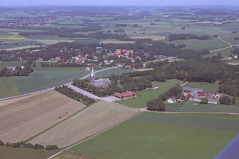 Motiv: Vinbergs kyrkby Nyckelord: Flygbilder, Riksintressen Kategori: KyrkbyVinbergs kyrkby